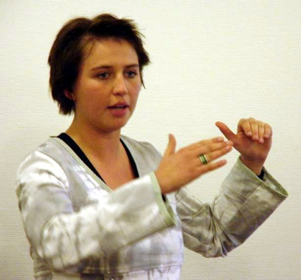 Mette Frederiksen i Værløse